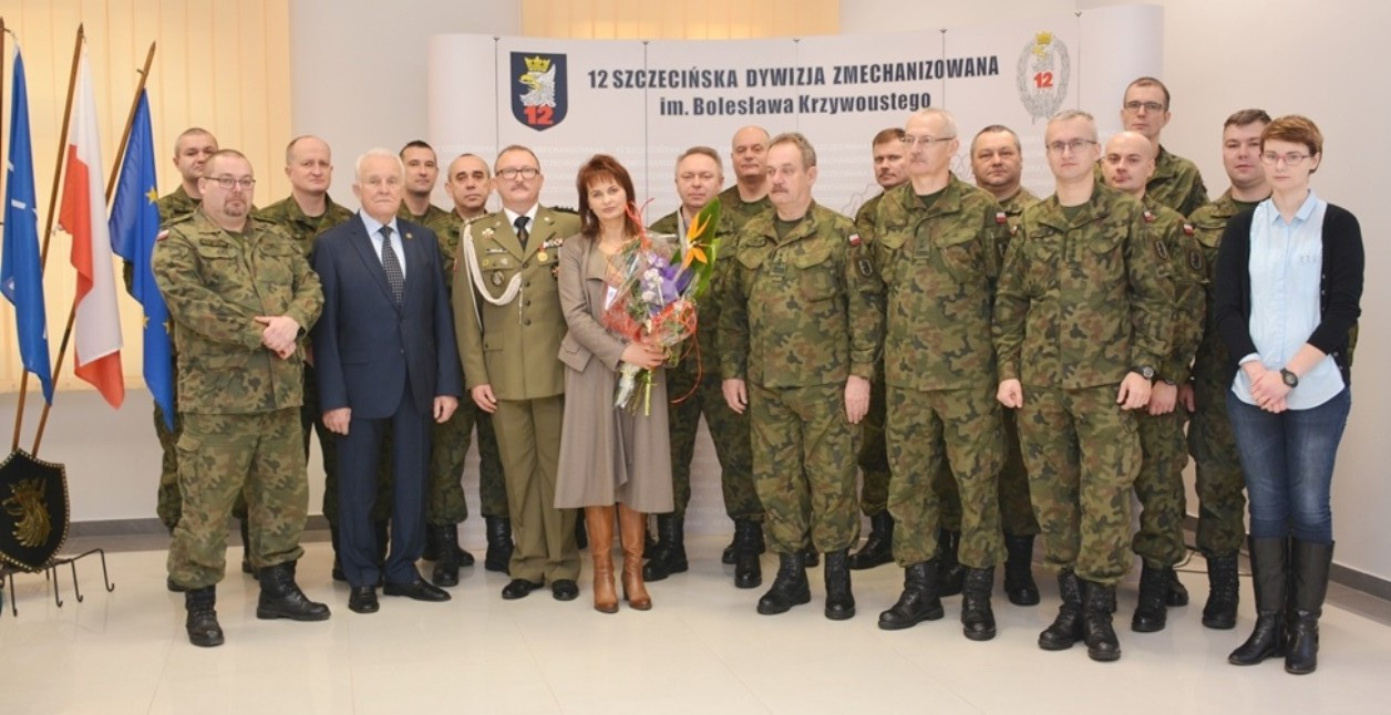 płk Dariusz Parylak pożegnanie z 12DZ